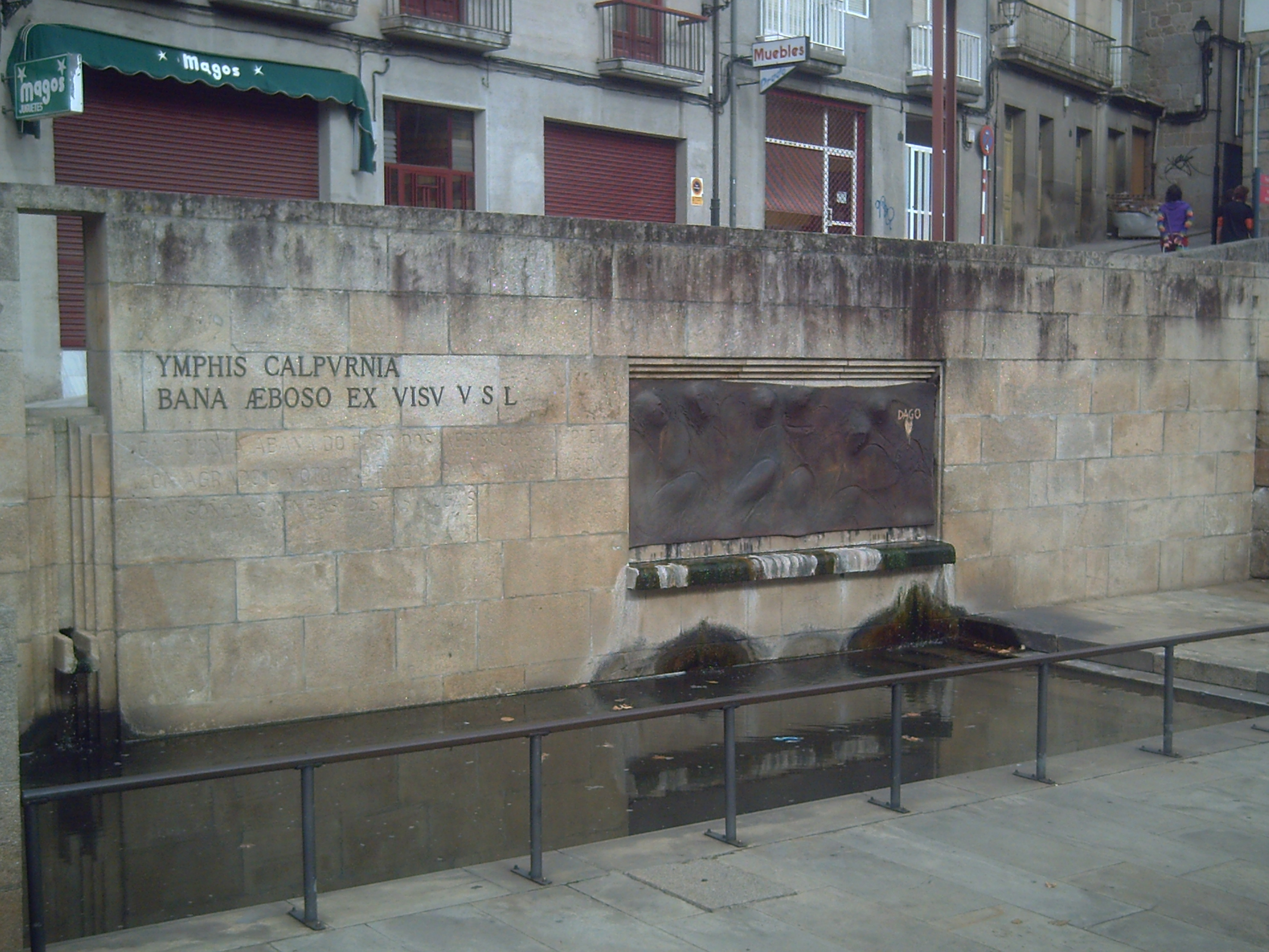 Estanque coa inscrición Latina Calpurnia...(Ourense)